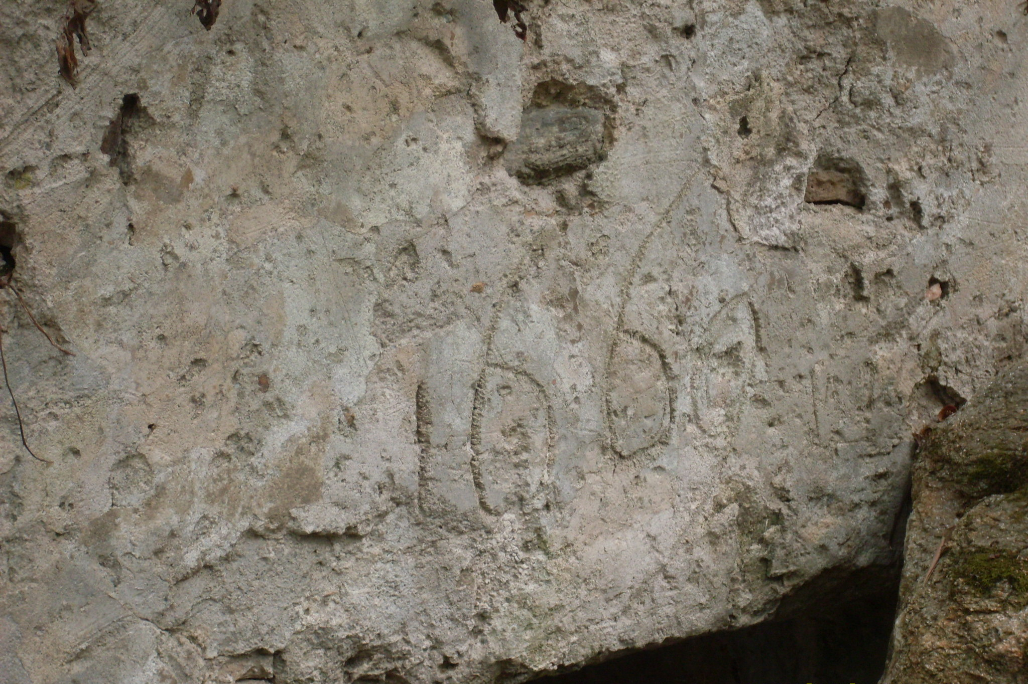 1669, data sottostante la scalinata d'ingresso della Cattedrale di Oppido Medievale, sicuramente la data del rifacimento dell'intonaco